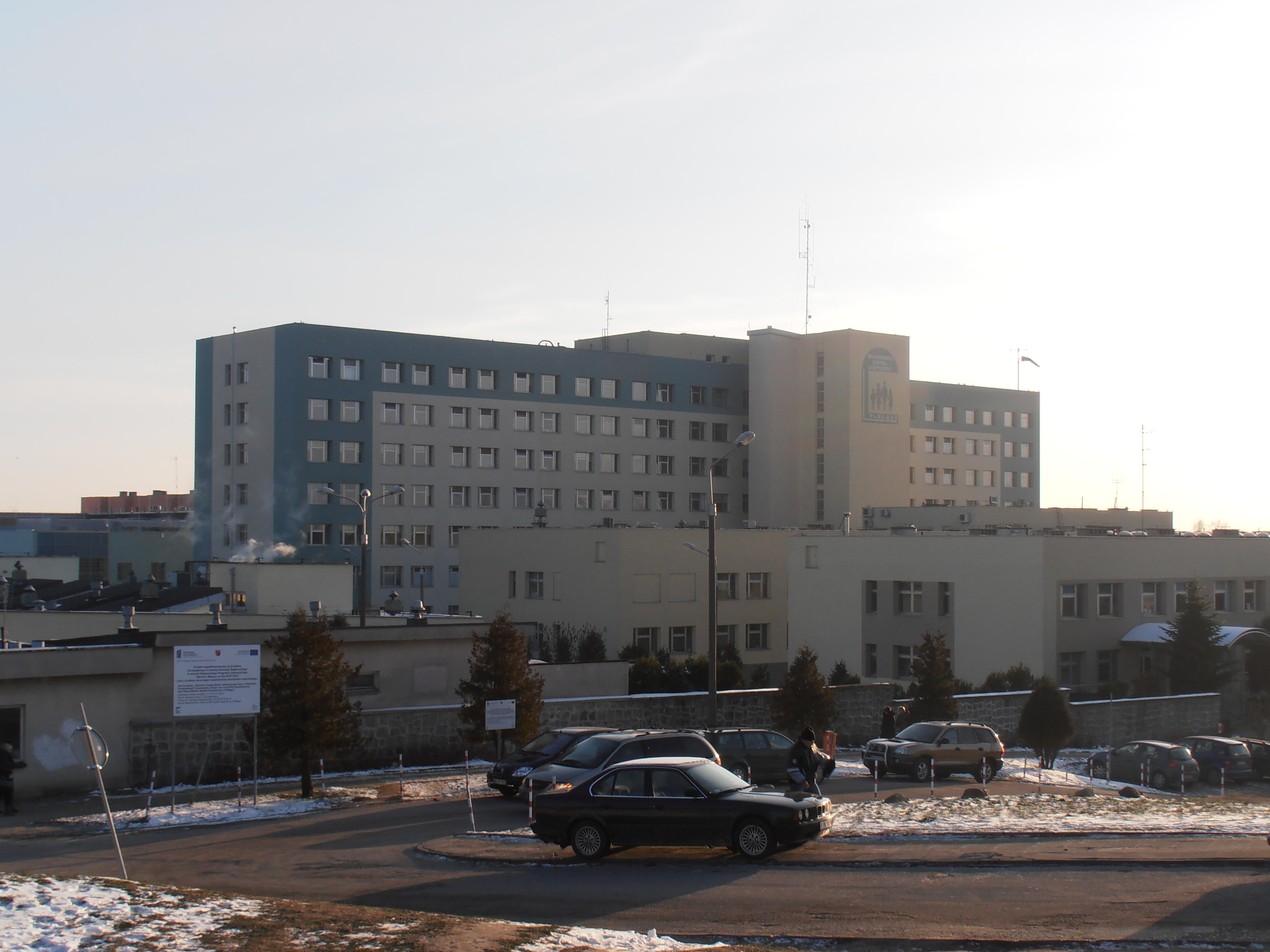 Wojewódzki Szpital Zespolony w Elblągu (21 stycznia 2014)